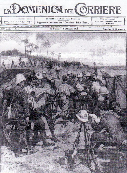 Fotocopia Copertina Domenica del Corriere n.4 anno 1912